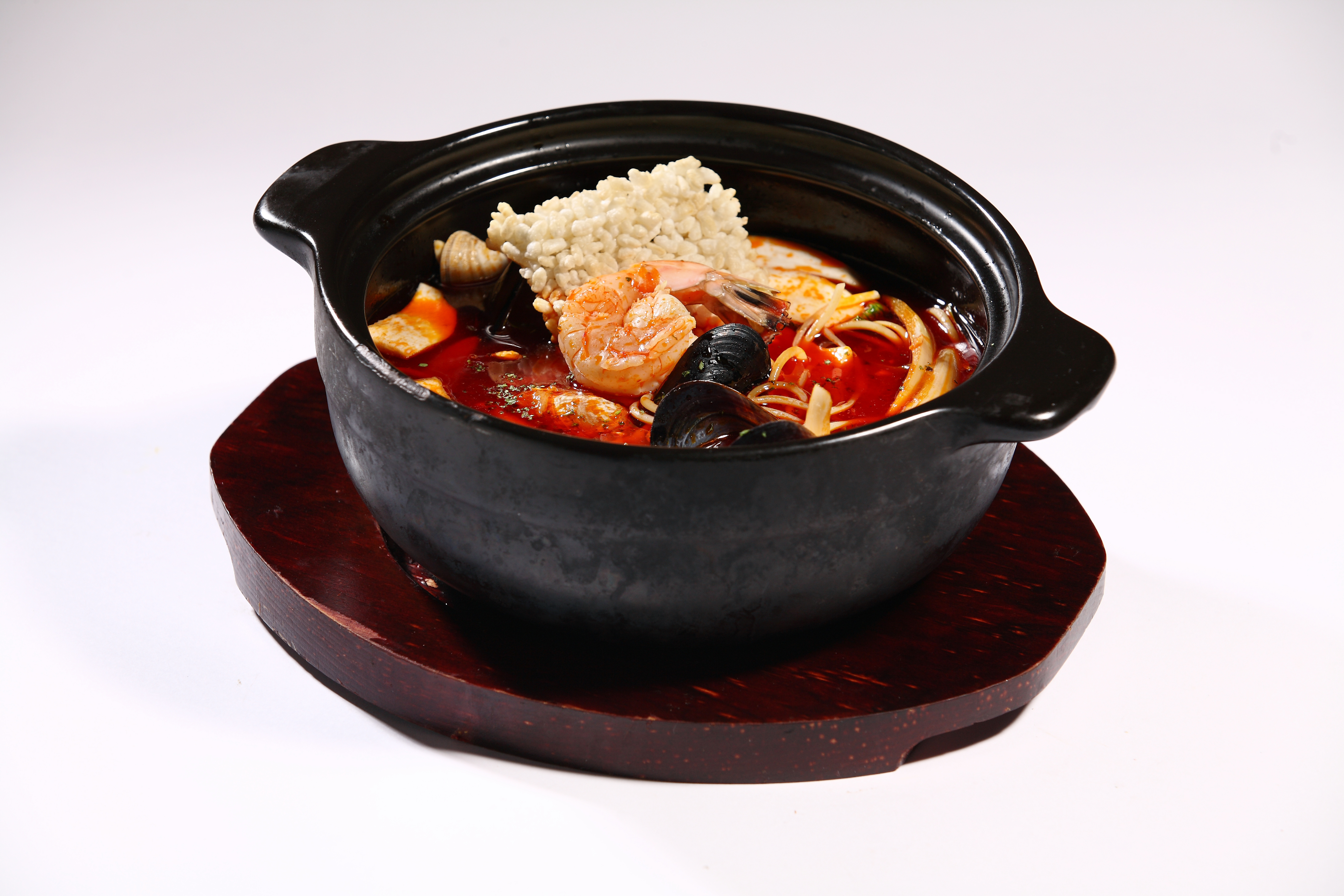 주식회사 엔아이에프앤씨 닐리 파스타 음식 사진(닐리 파스타 과천점)